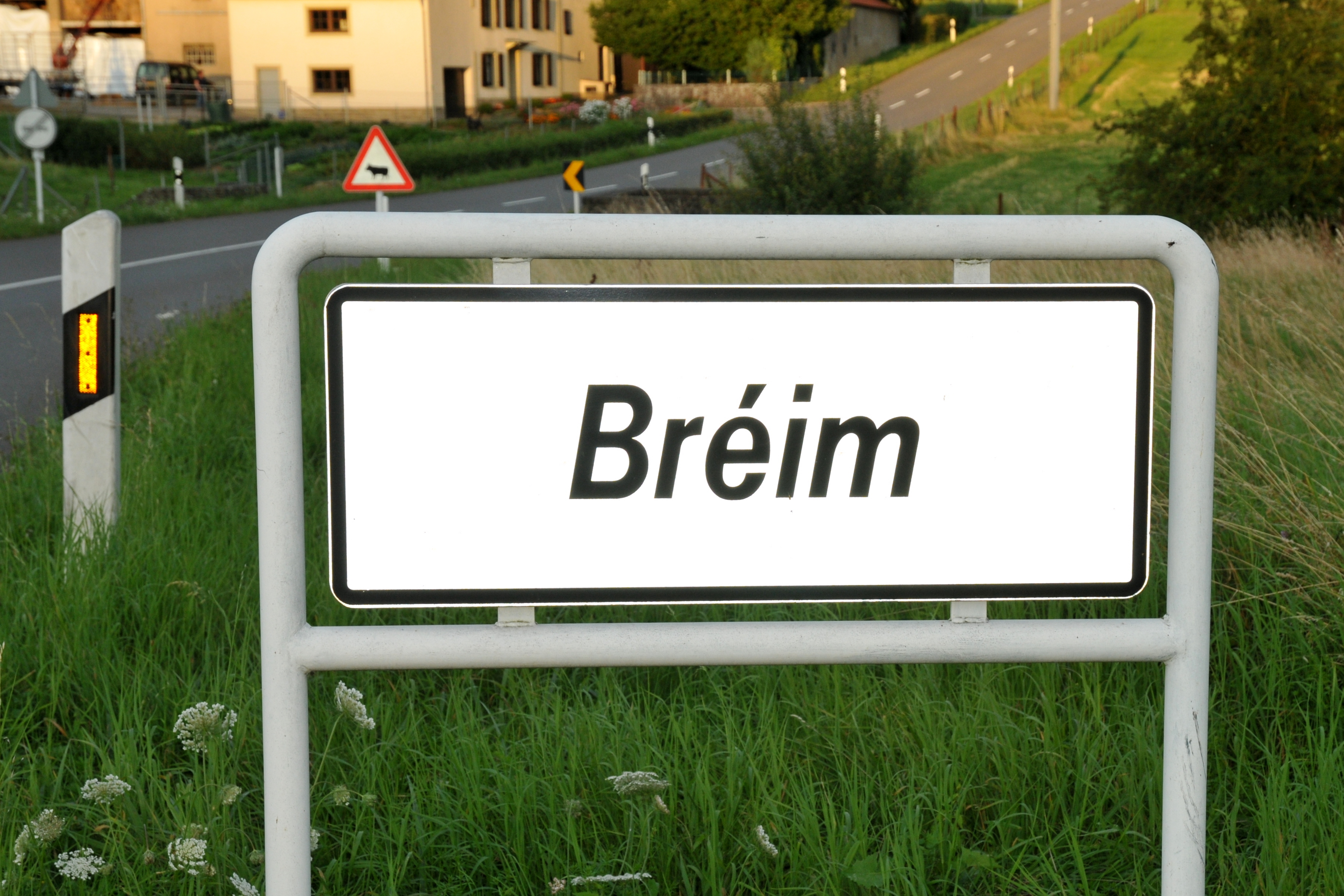 Uertschaftsschëld zu Bréim.